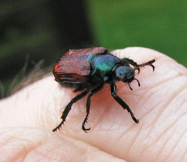 Beschreibung: Gartenlaubkäfer (Phyllopertha horticola) Fotograf: Darkone, 3. Juni 2005